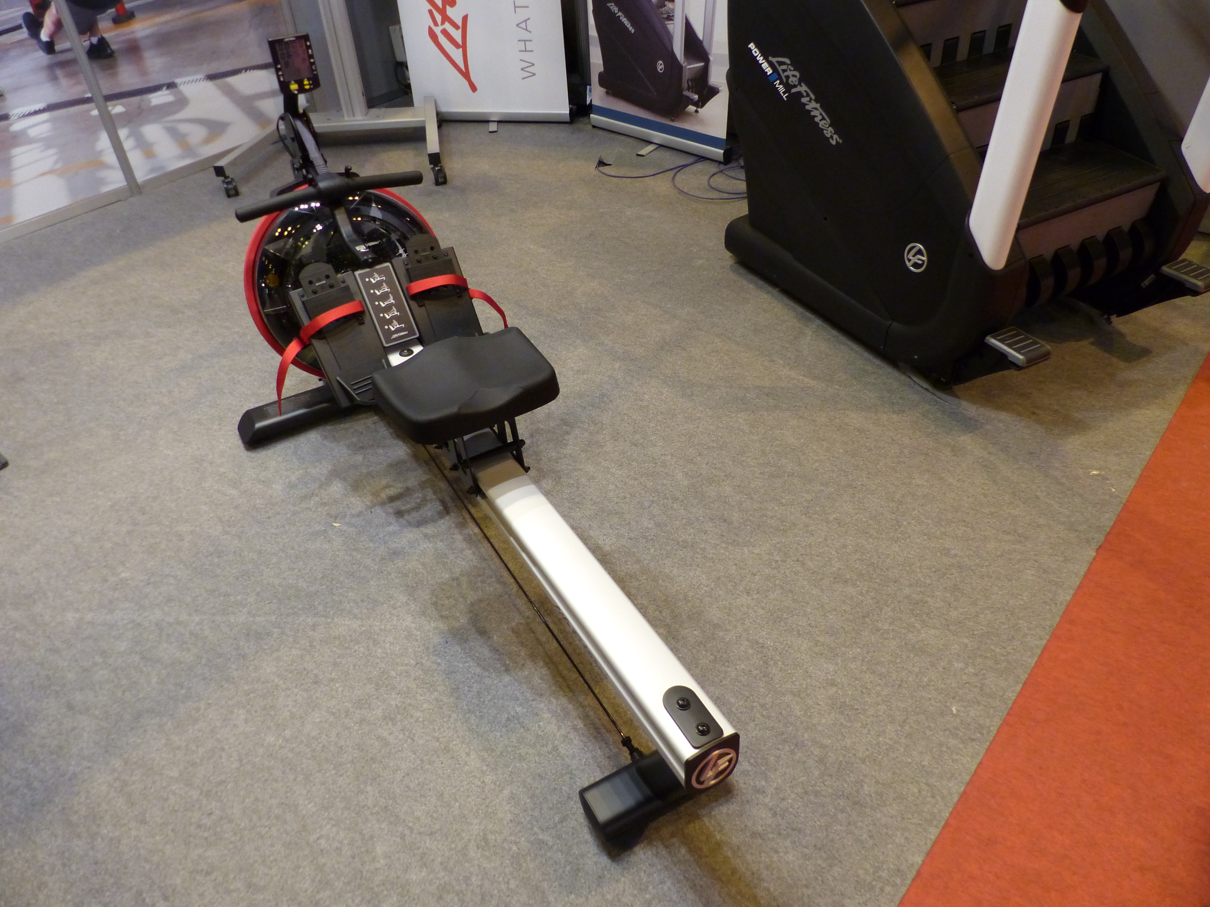 Life Fitness, waterrower